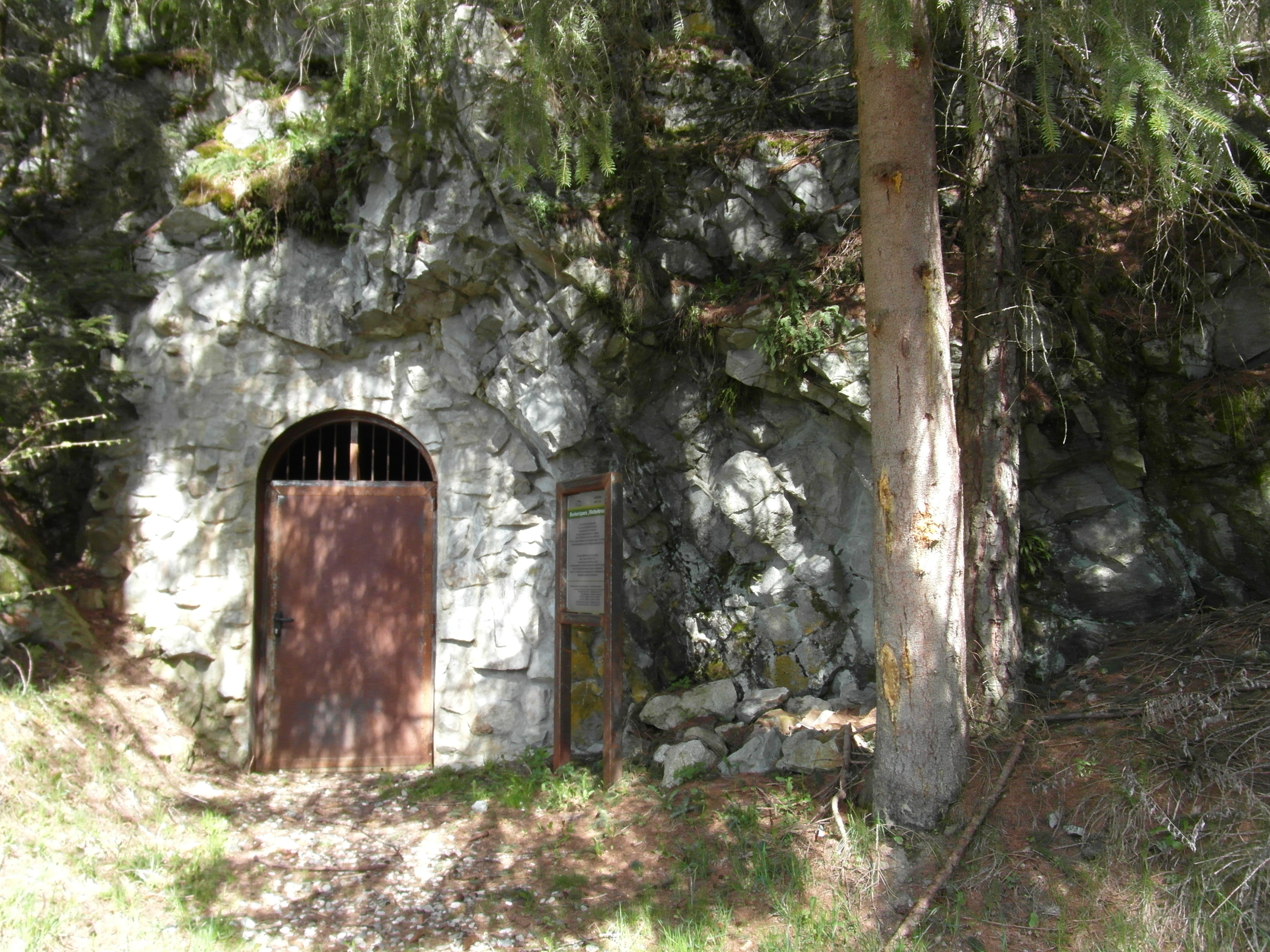 Opera 24 Sciaves